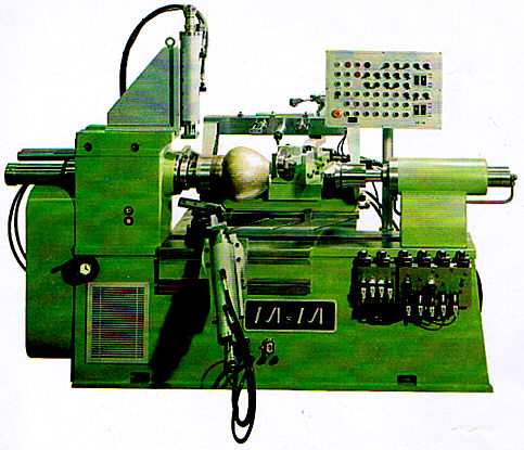 Wyoblarka automatyczna, użycie za podaniem autorstwa (Creative Commons CC-BY 2.5)